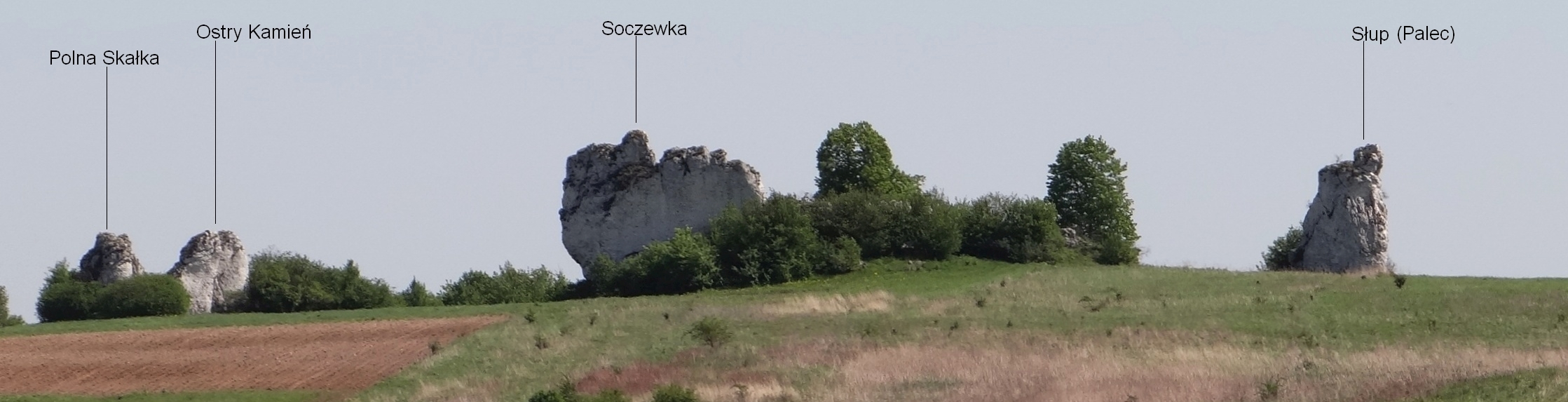 4 najdalej na północ wysunięte ostańce wna wzgórzu 02 w Jerzmanowicach